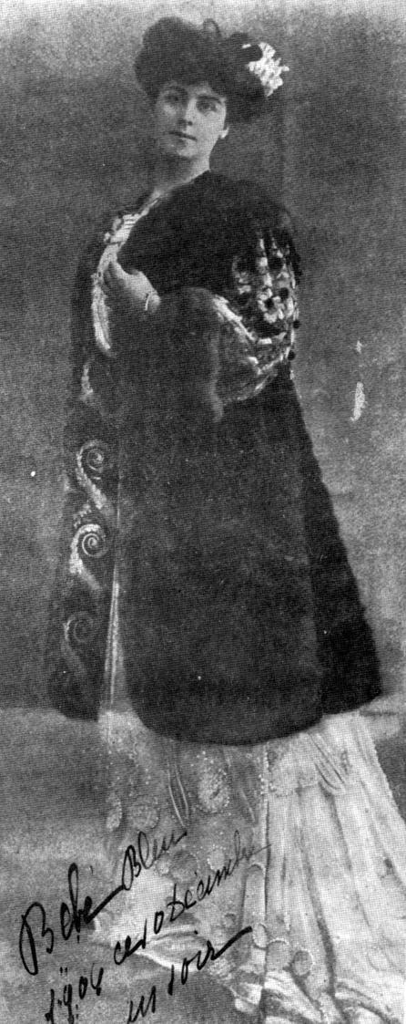 Maria Tescanu Rosetti (conosciuta anche come Maruca Cantacuzino e Maruca Enescu) nel 1904